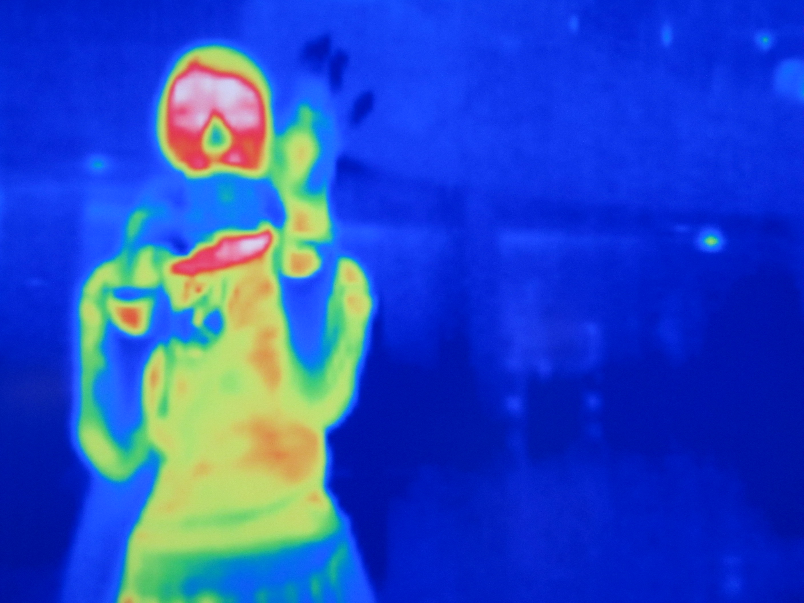 Fotograafi autoportree Tartu AHHAA keskuse soojuskaameras.